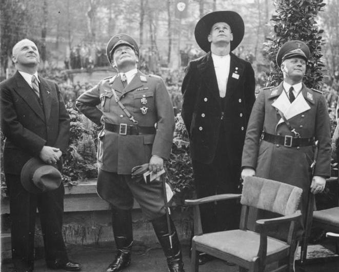 Scherl: Richtfest des neuen Reichsluftfahrtministeriums in Berlin am 12. Oktober 1935. vlnr: Der Baumeister Prof. Dr. Ing. [Ernst] Sagebiel, Reichsluftfahrtminister General der Flieger Hermann Göring, der Zimmerpolier Franz Hecht, der den Richtspruch sprach, Staatssekretär [Erhard] Milch beobachten das Hochziehen der großen Richtkrone. 33689-35